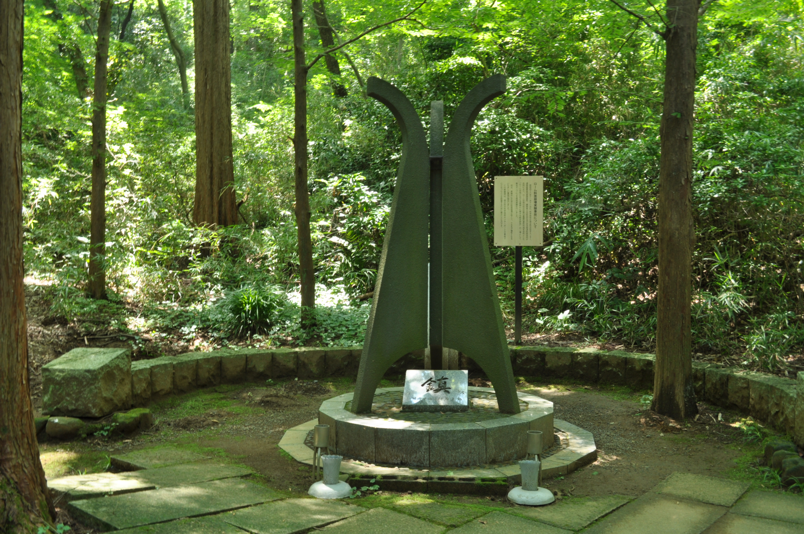 生田緑地の慰霊碑